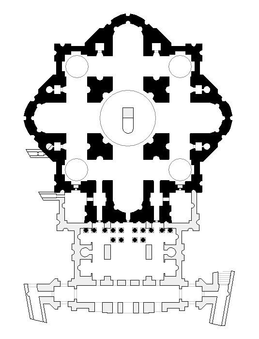 Basilica di San Pietro in Vaticano, Roma: progetto di Michelangelo a confronto con la situazione attuale.